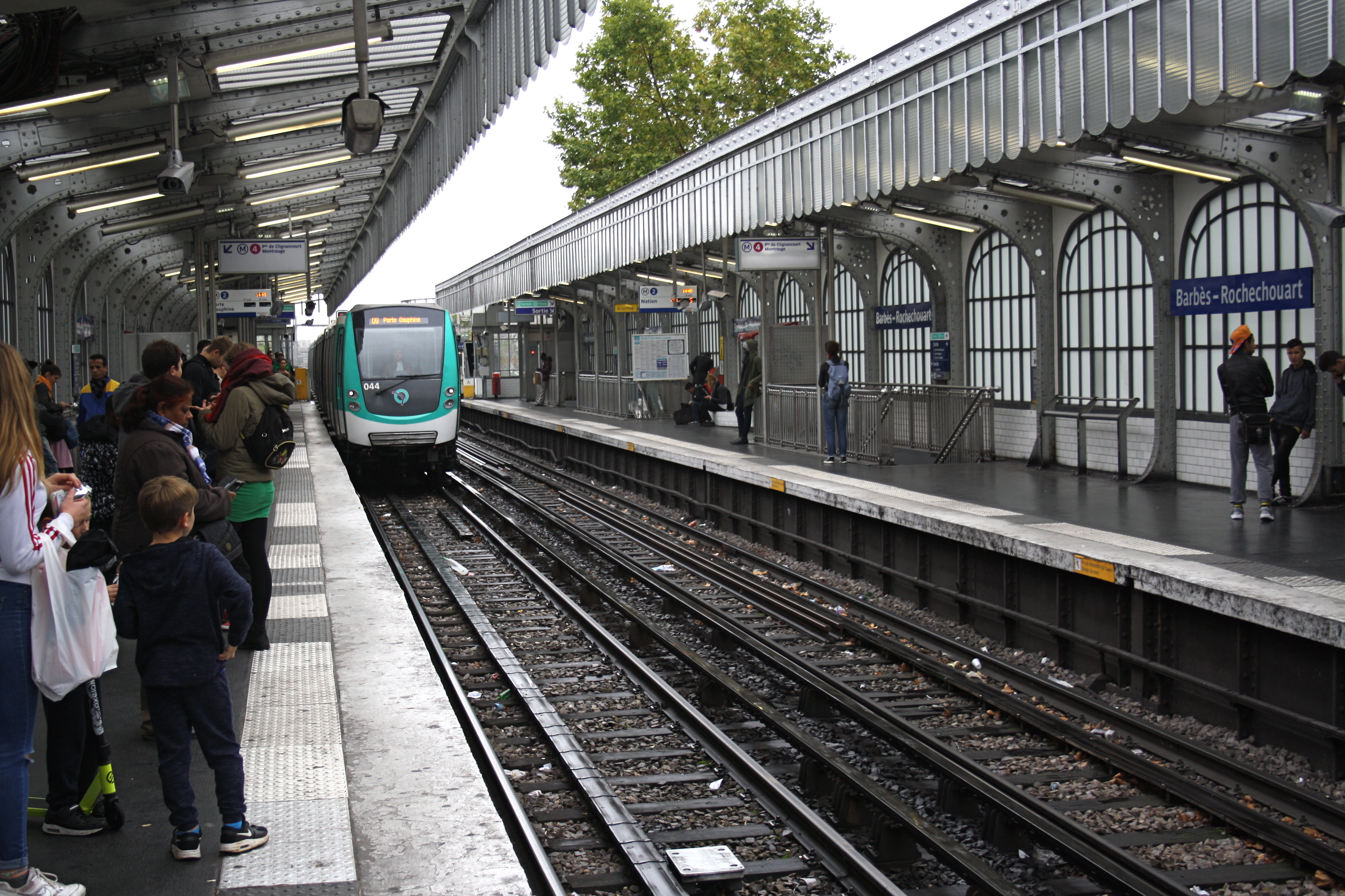 MF 01 in der Métrostation Barbès – Rochechouart